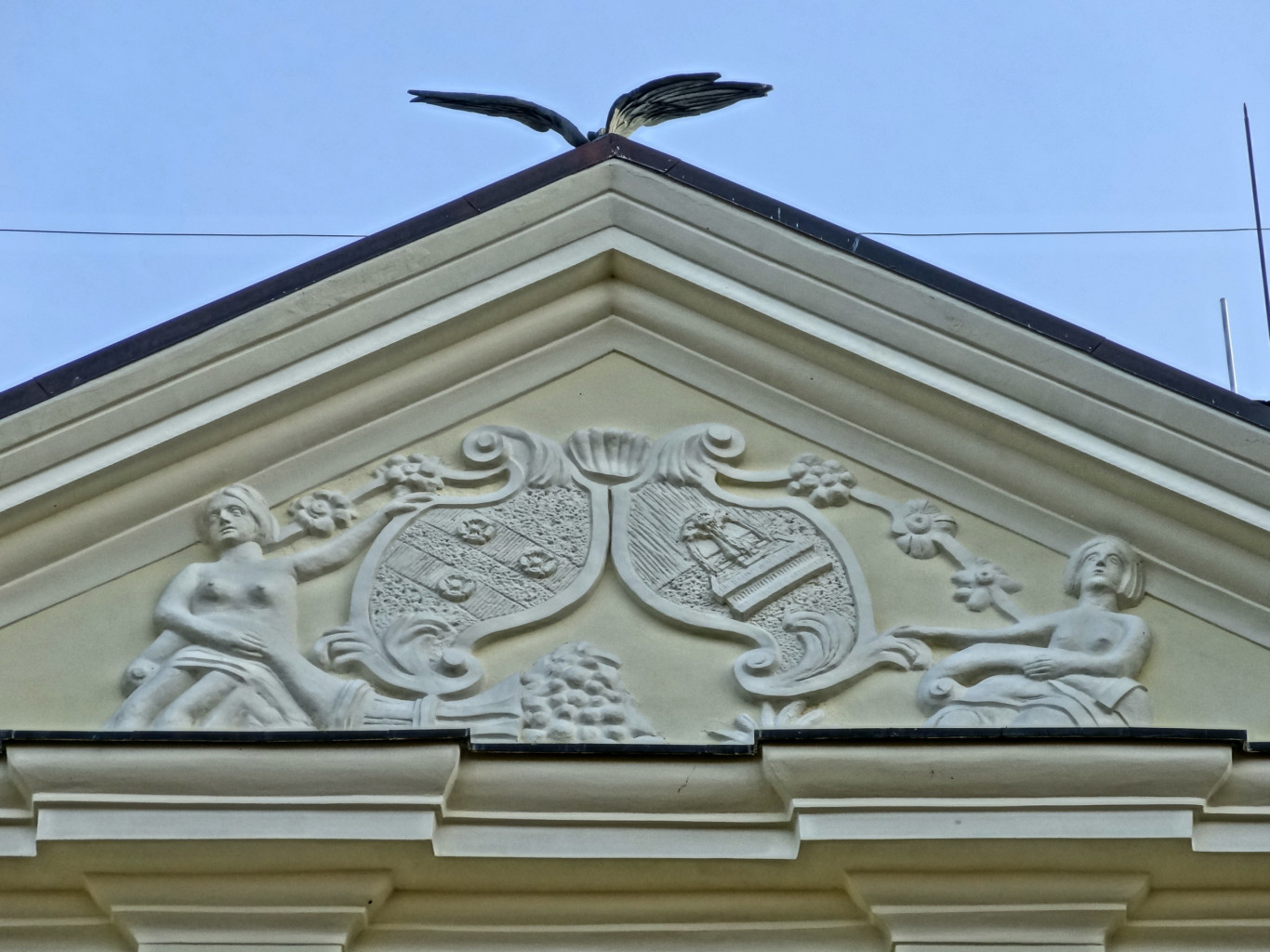 Barokowy pałac (poł. XVIII w.) w Ostromecku k. Bydgoszczy, zwany Starym zbudowany w stylu saskiego rokoka na polecenie wojewody pomorskiego Pawła Michała Mostowskiego